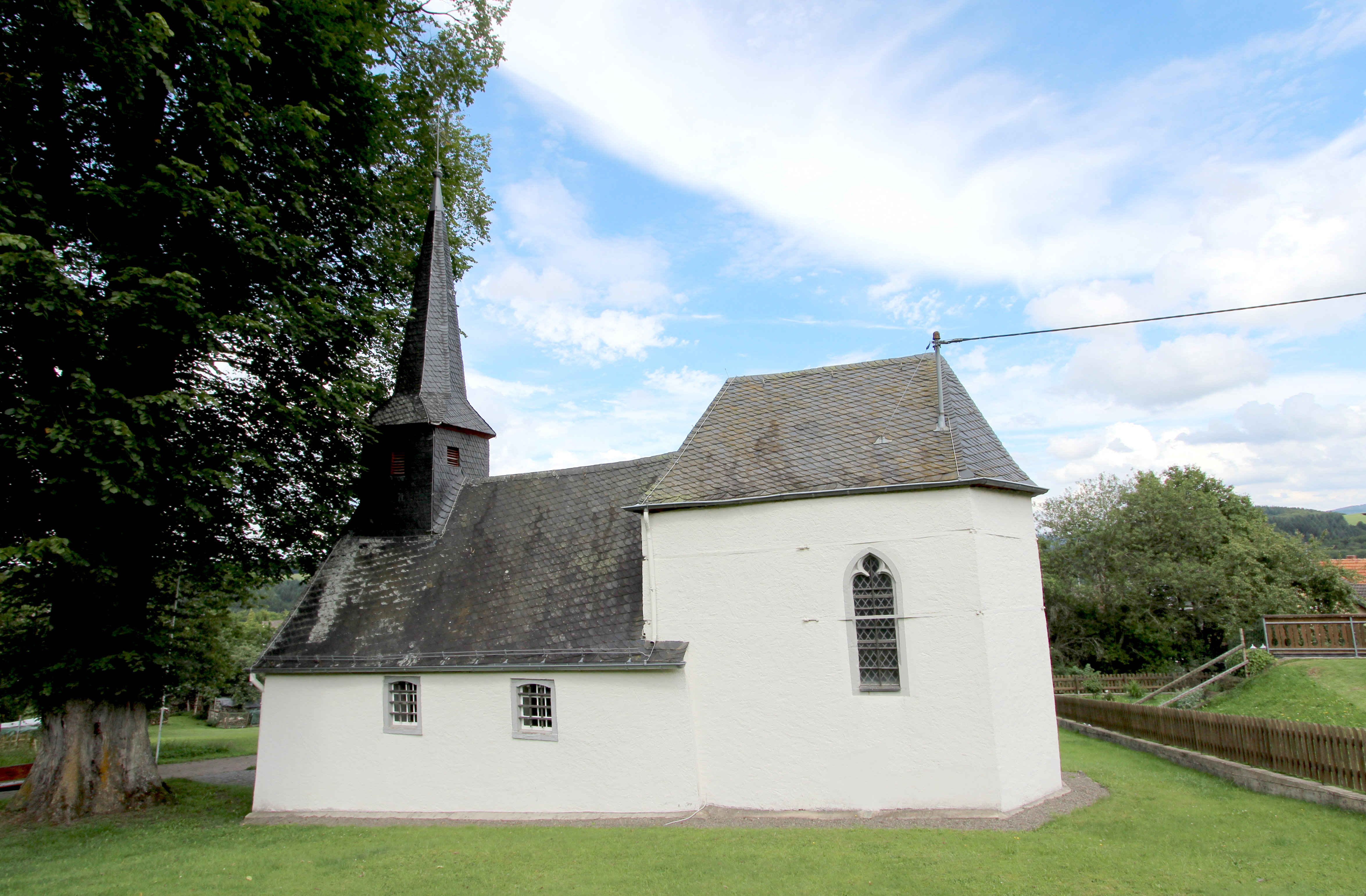 53518 Kottenborn, Kirchstraße. Katholische Filialkirche St. Antonius der Einsiedler. Chor bezeichnet 1525, Saalbau aus dem 17. Jahrhundert; Grabkreuz, bezeichnet 1673; Gesamtanlage mit umgebendem Areal. Aufnahme von 2017.